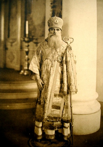 Епископ Сергий (Тихомиров)